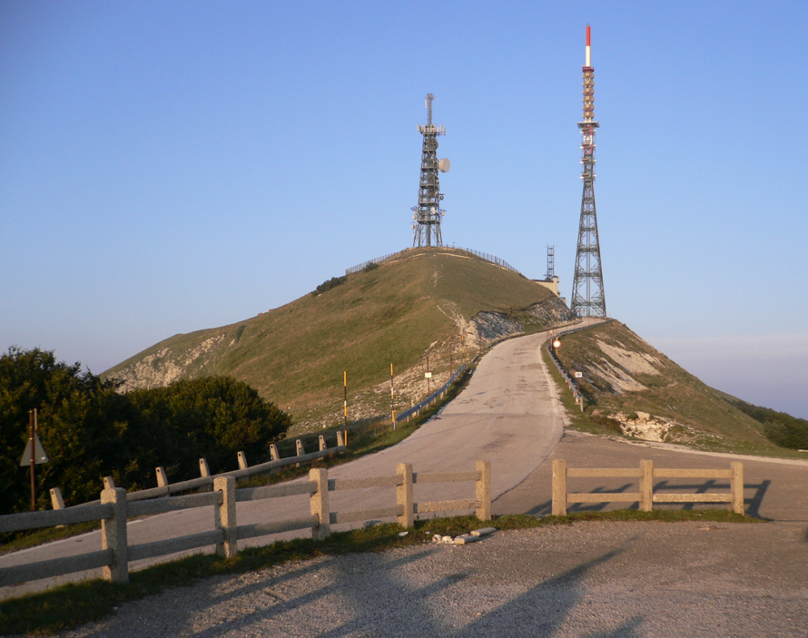 vetta del m. Nerone, impianto di trasmissione radio